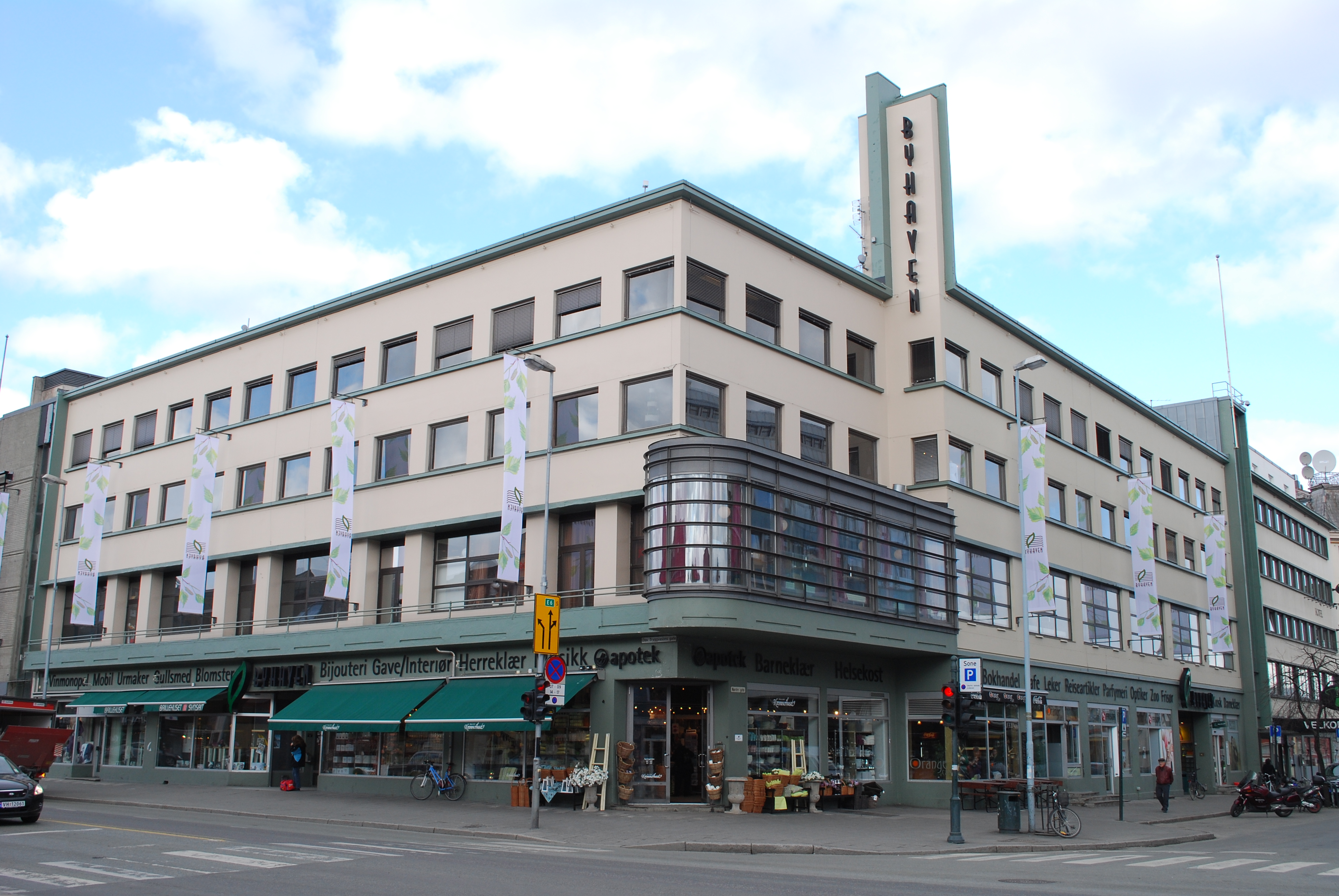 Kjøpesenteret Byhaven ved Olav Tryggvasons gate i Trondheim.